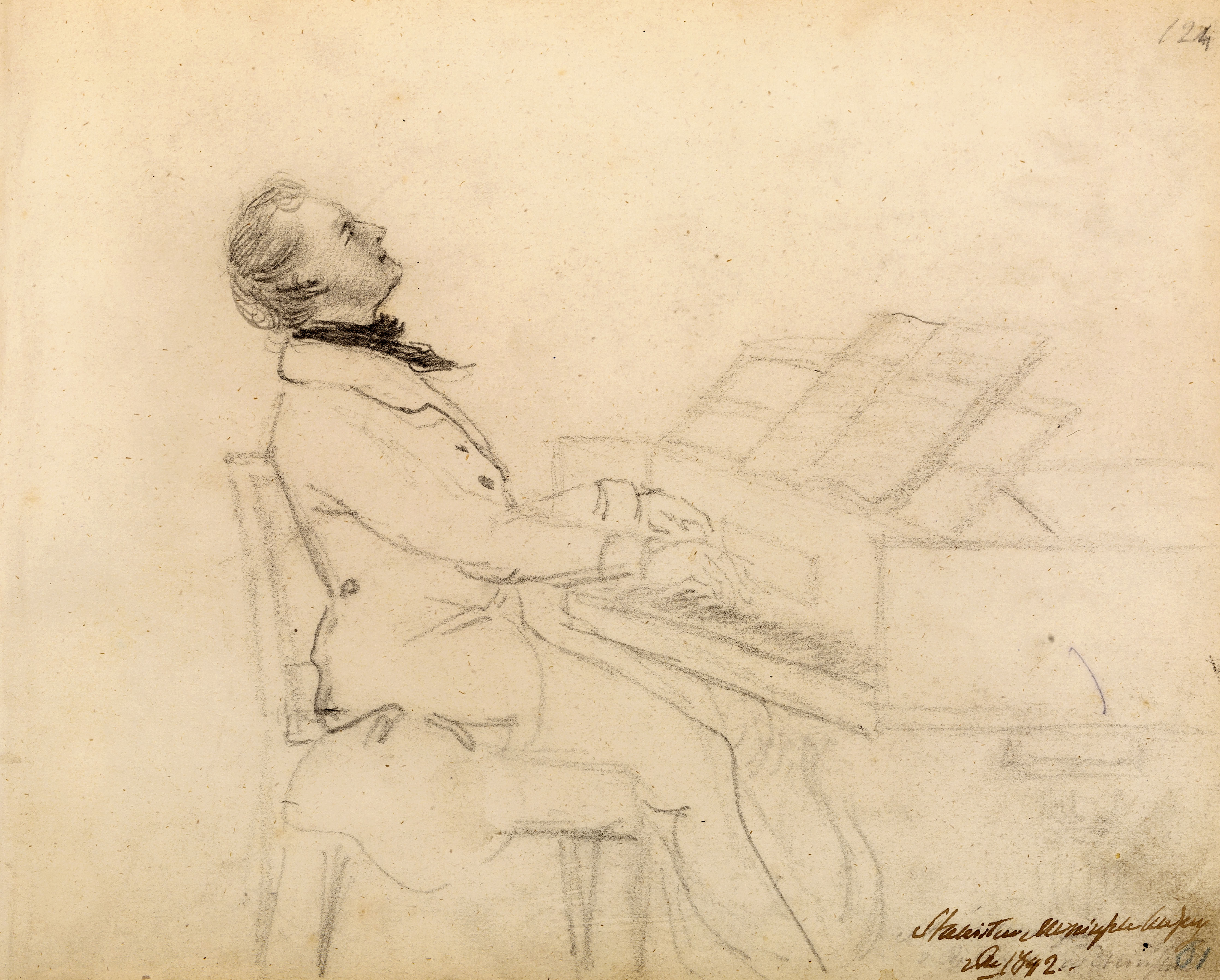 Беларуская (тарашкевіца): Партрэт Станіслава Манюшкі (Stanisłaŭ Maniuška)